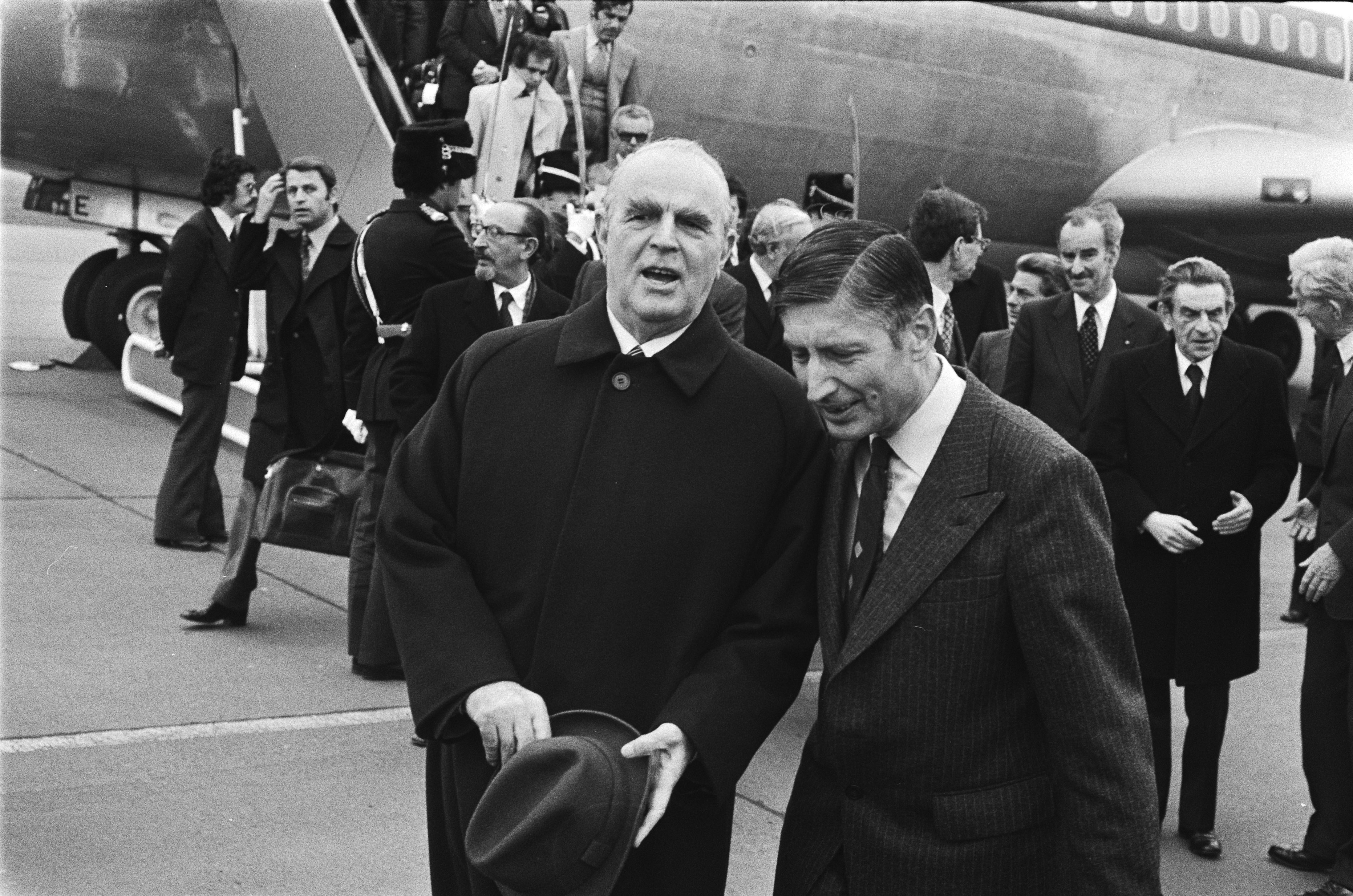 Collectie / Archief : Fotocollectie Anefo Reportage / Serie : [ onbekend ] Beschrijving : Bezoek premier Karamanlis van Griekenland; Van Agt in gesprek met Karamanlis Datum : 5 april 1978 Locatie : Griekenland Trefwoorden : GESPREKKEN, bezoeken, premiers Persoonsnaam : Karamanlis Fotograaf : Verhoeff, Bert / Anefo Auteursrechthebbende : Nationaal Archief Materiaalsoort : Negatief (zwart/wit) Nummer archiefinventaris : bekijk toegang 2.24.01.05 Bestanddeelnummer : 929-6547